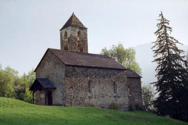 Kirche St. Johann auf Hohen Rätien